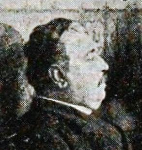 De pie: General Velásquez, General Barbosa, Julio Baladas E. Guillermo Mackenna, José M. Valdés Carrera. Sentados: Pedro N. Gandarillas, Enrique S. Sanfuenfes. Presidente Balmaceda, Juan Mackenna.